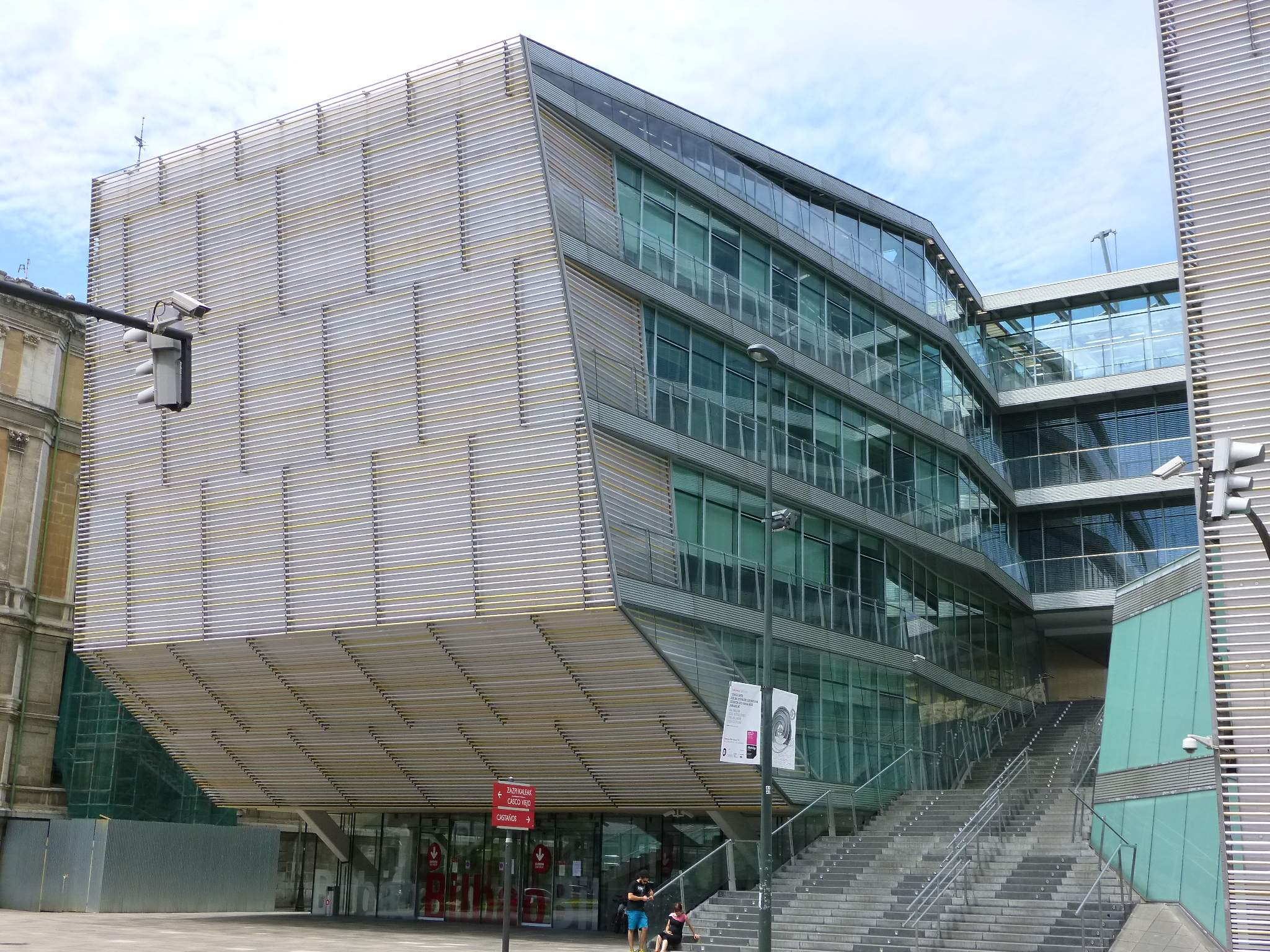 Nueva Sede Municipal de San Agustín (Bilbao)